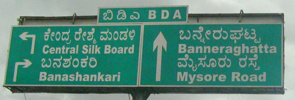 ബാംഗളൂർ ബെന്നാർഗട്ട റോഡ്, ബിലേക്ക ഹള്ളിക്ക് സമീപം